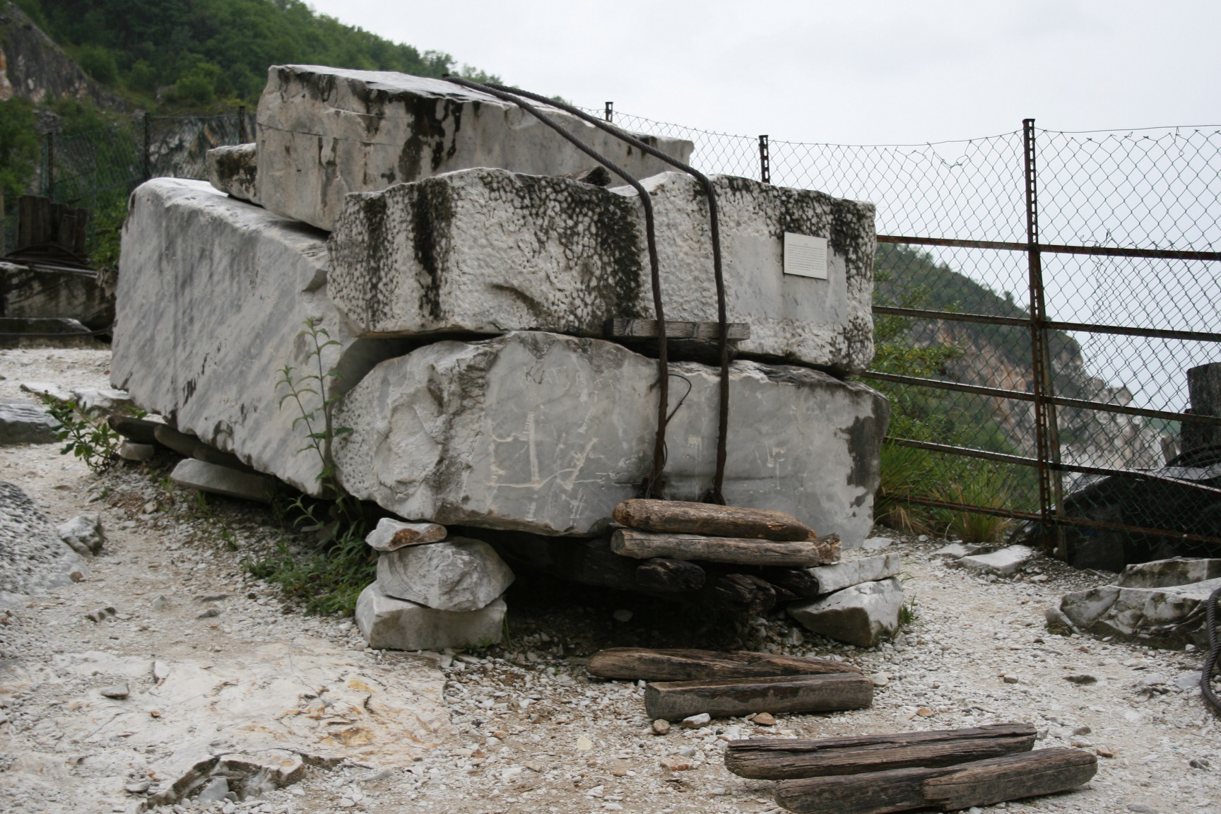 Lizzatura